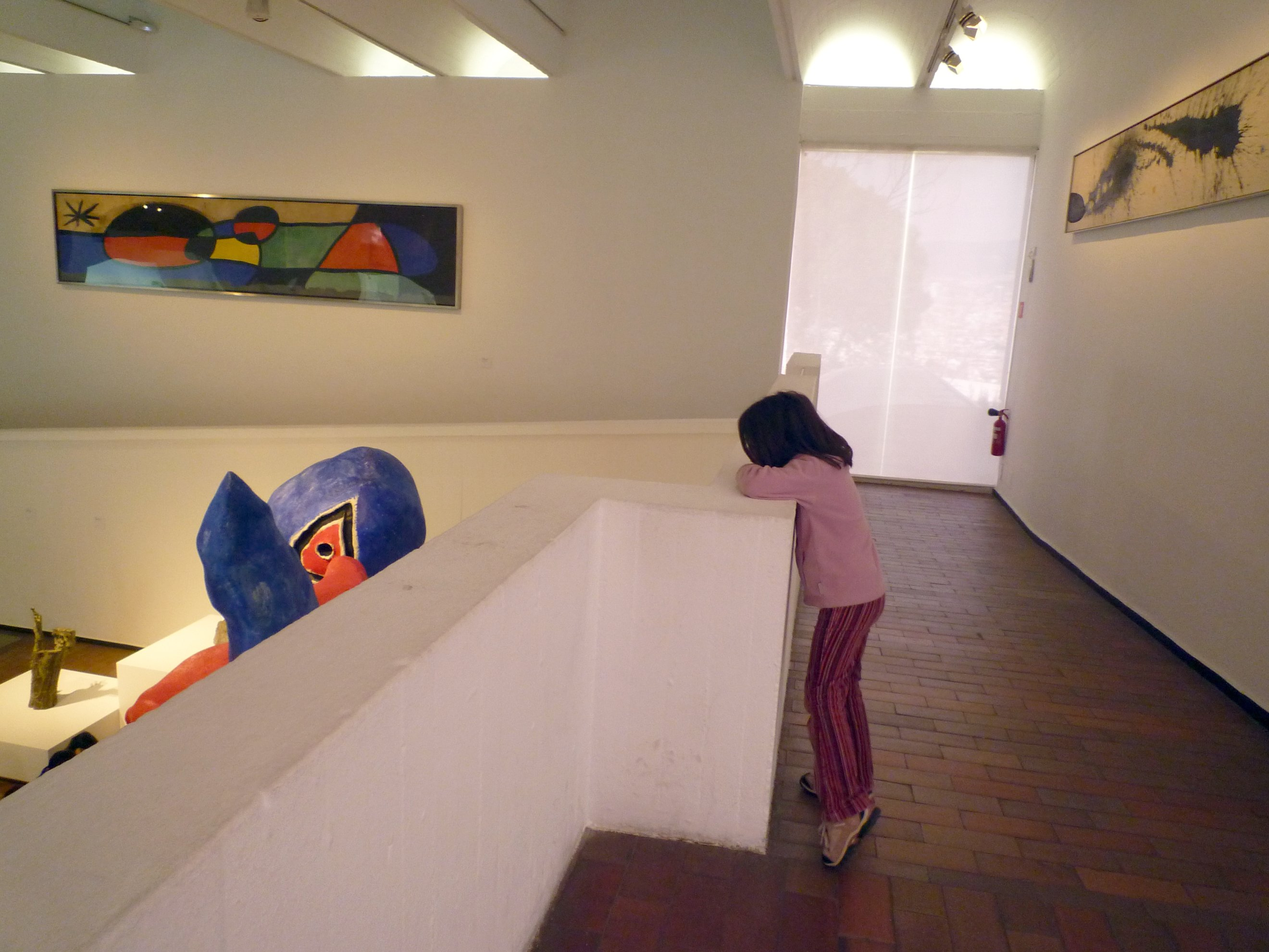 Fundació Miró (Barcelona)